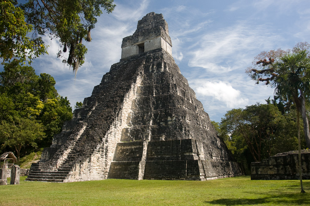 Grand Plaza - Temple I